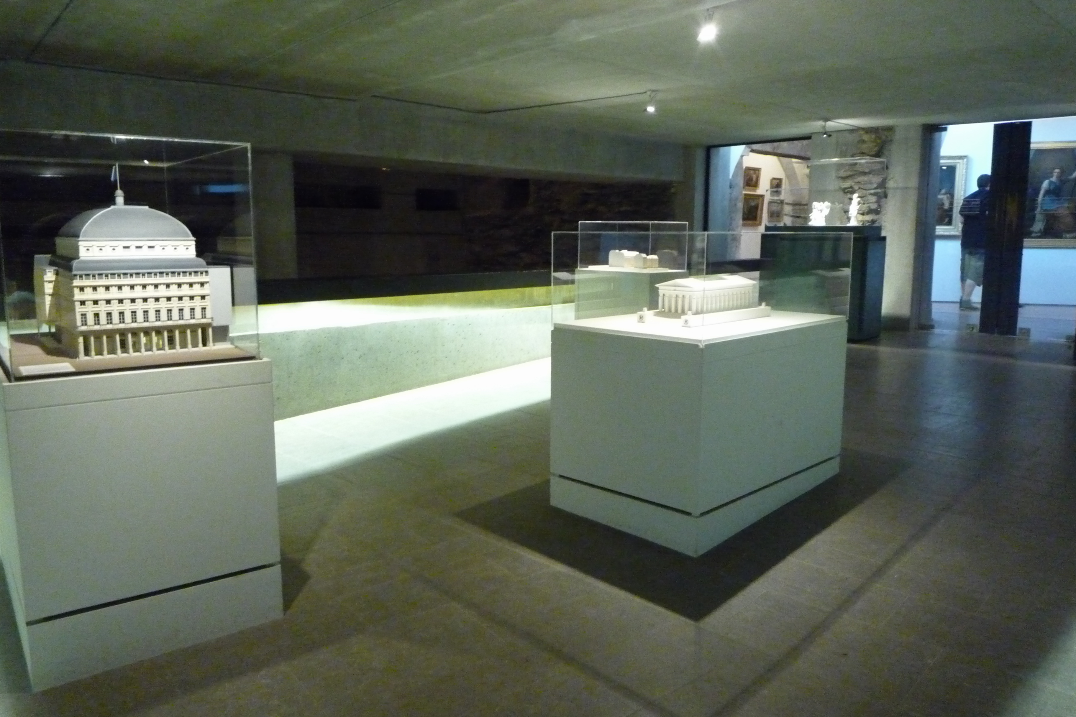 Salle de l'architecture, musée de la Révolution française.